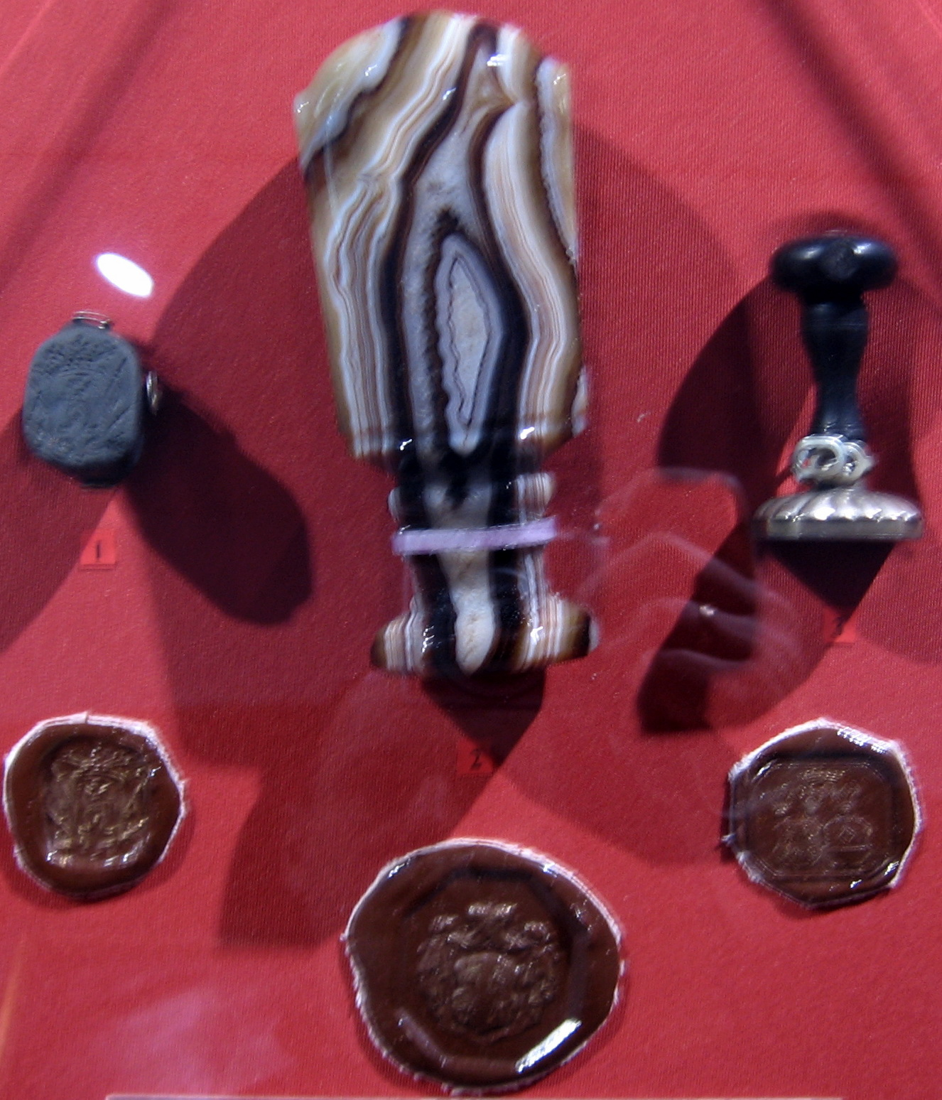 Печать из минералов